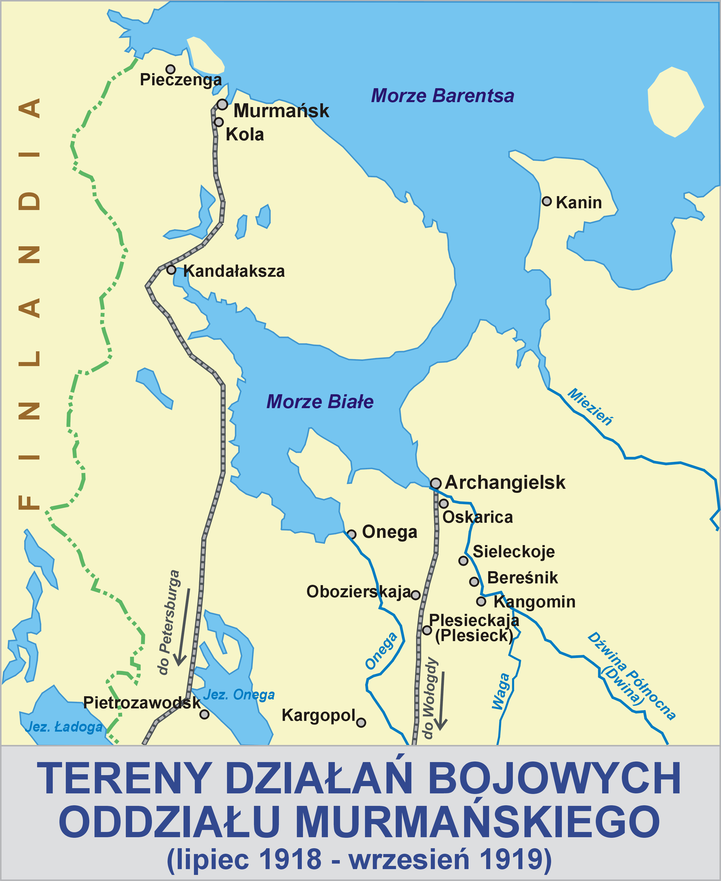 Tereny działań Oddziału Murmańskiego (lipiec - wrzesień 1918)